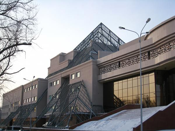 Областной драматический театр в Караганде